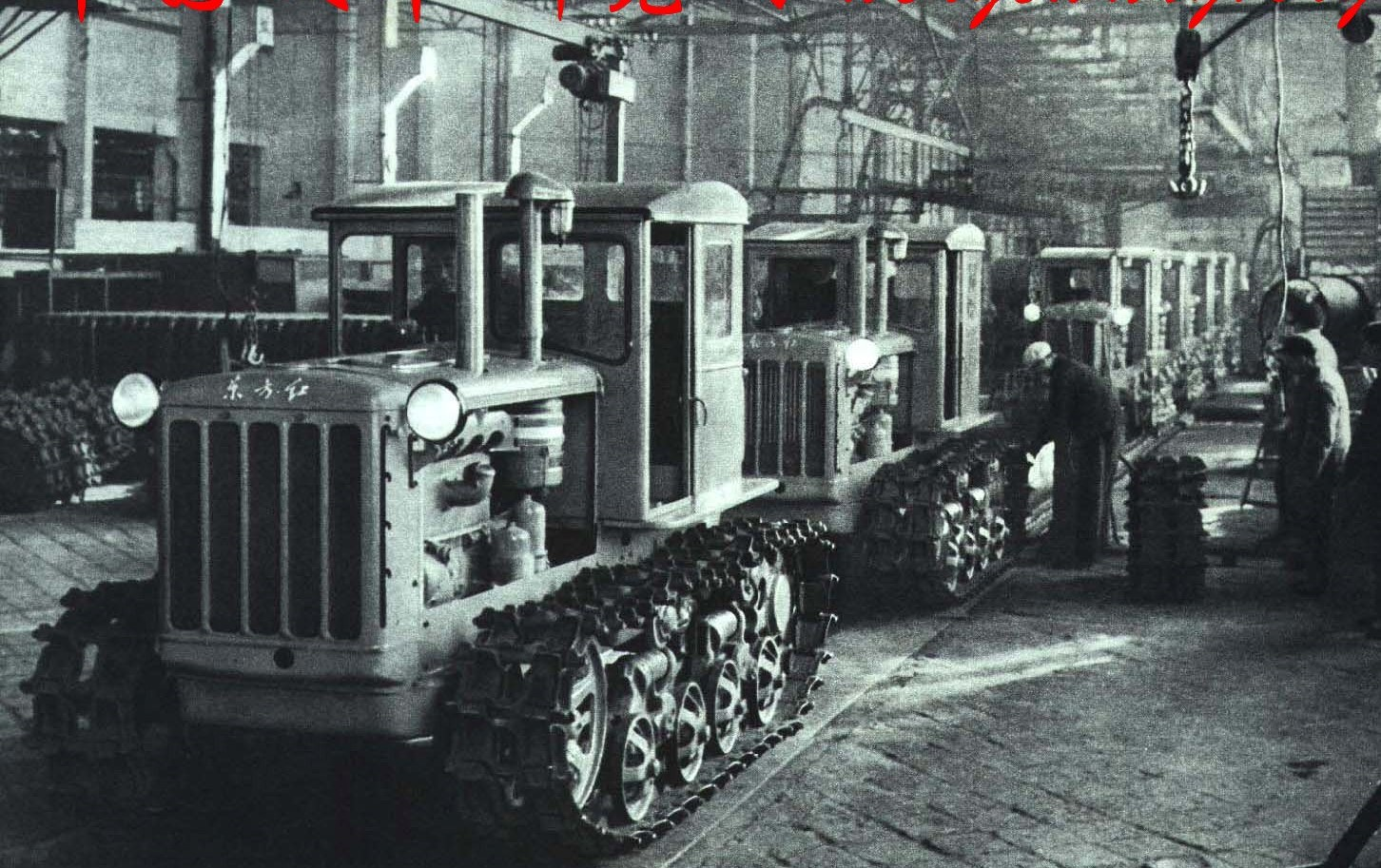 1964-04 1964年 洛阳拖拉机厂 东方红拖拉机